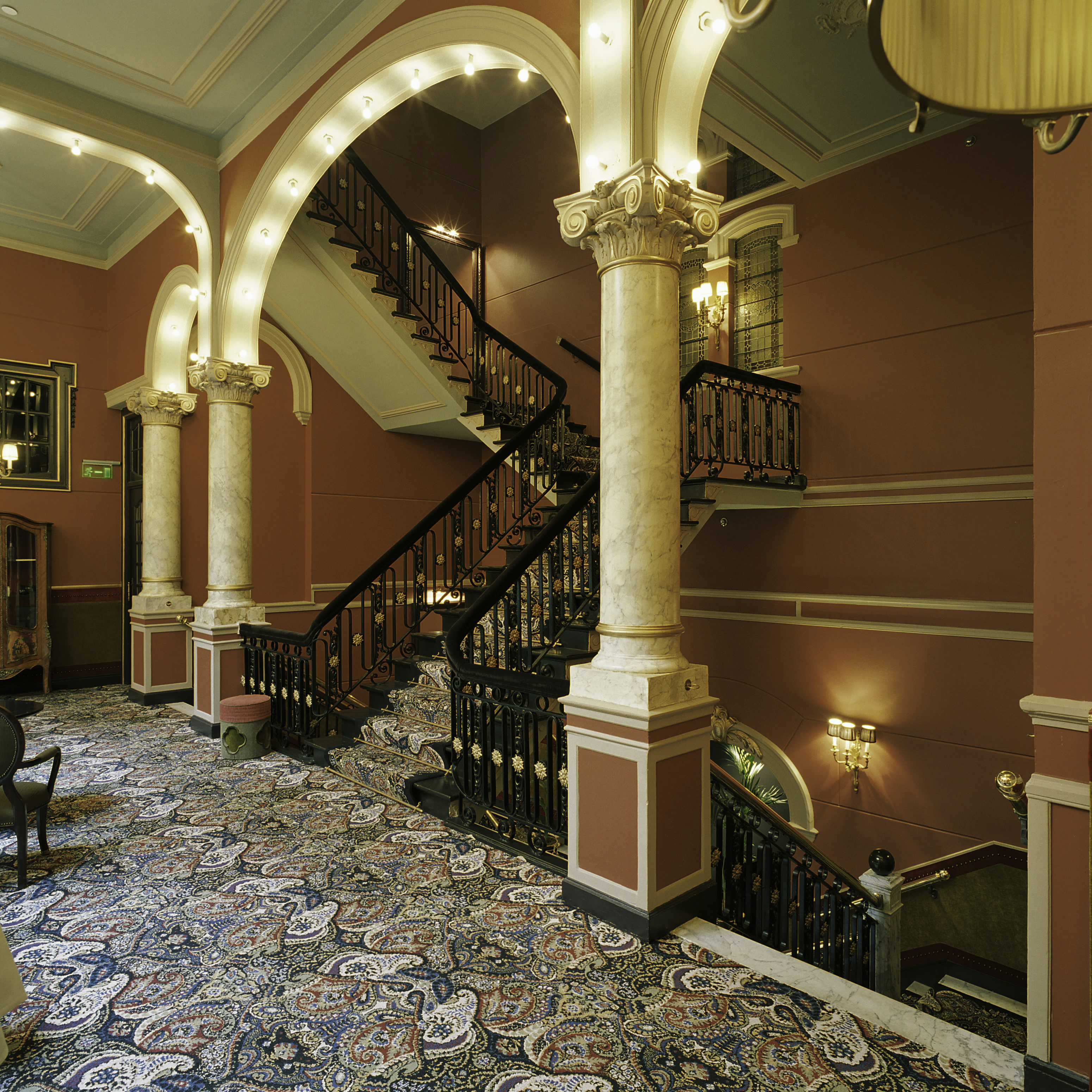 Hotel des Indes: Interieur, overzicht van het trappenhuis op de eerste verdieping